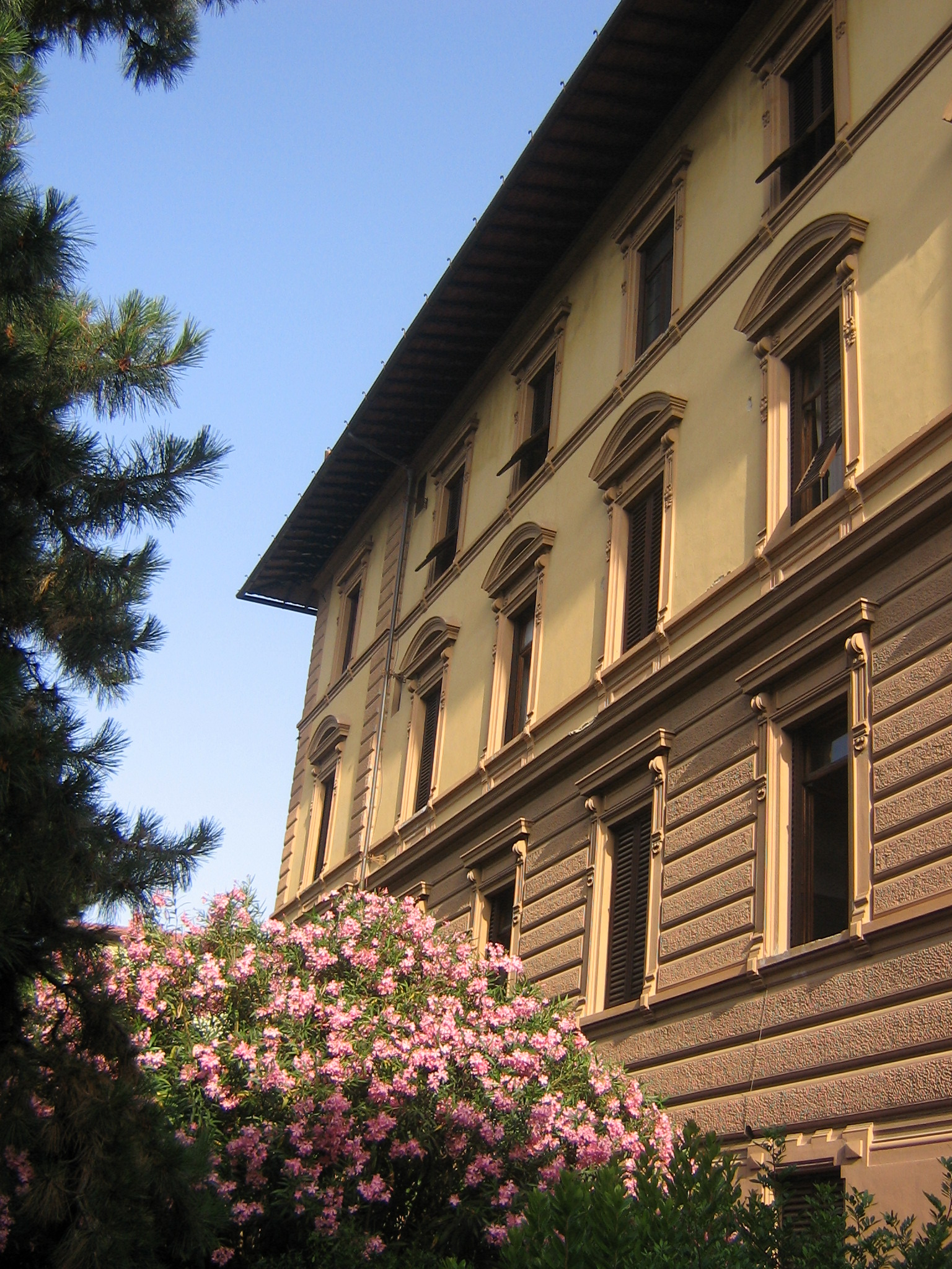 Liceo Ginnasio Dante, vista dal giardino.